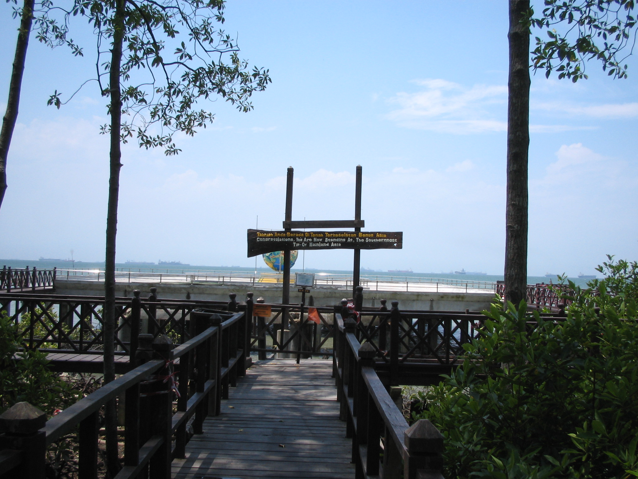 タンジュン・ピアイにあるアジア大陸最南端の地